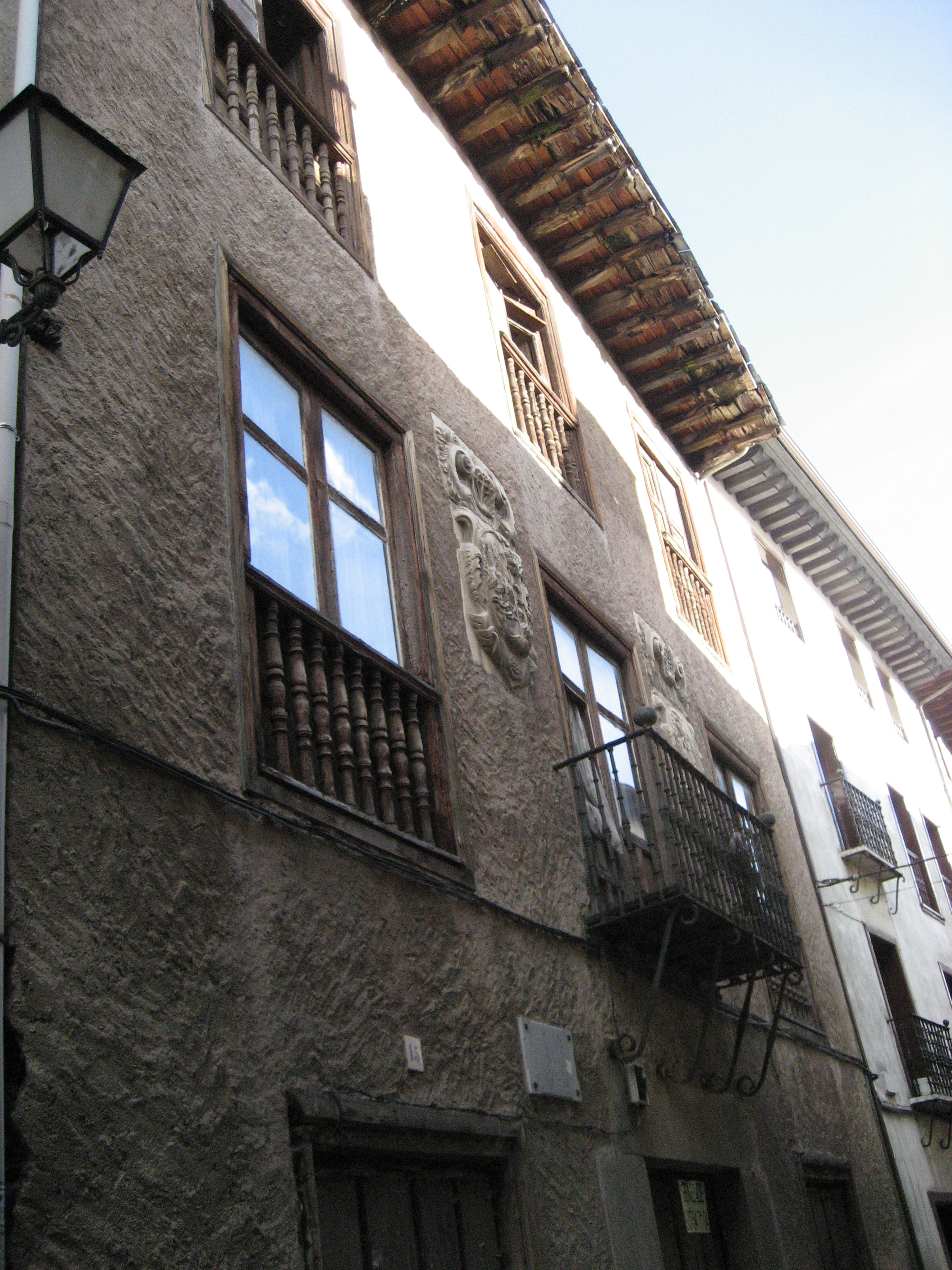 Casa donde nació el poeta Gil y Carrasco en Villafranca del Bierzo